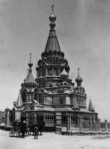 Баку. Александро-Невский Собор